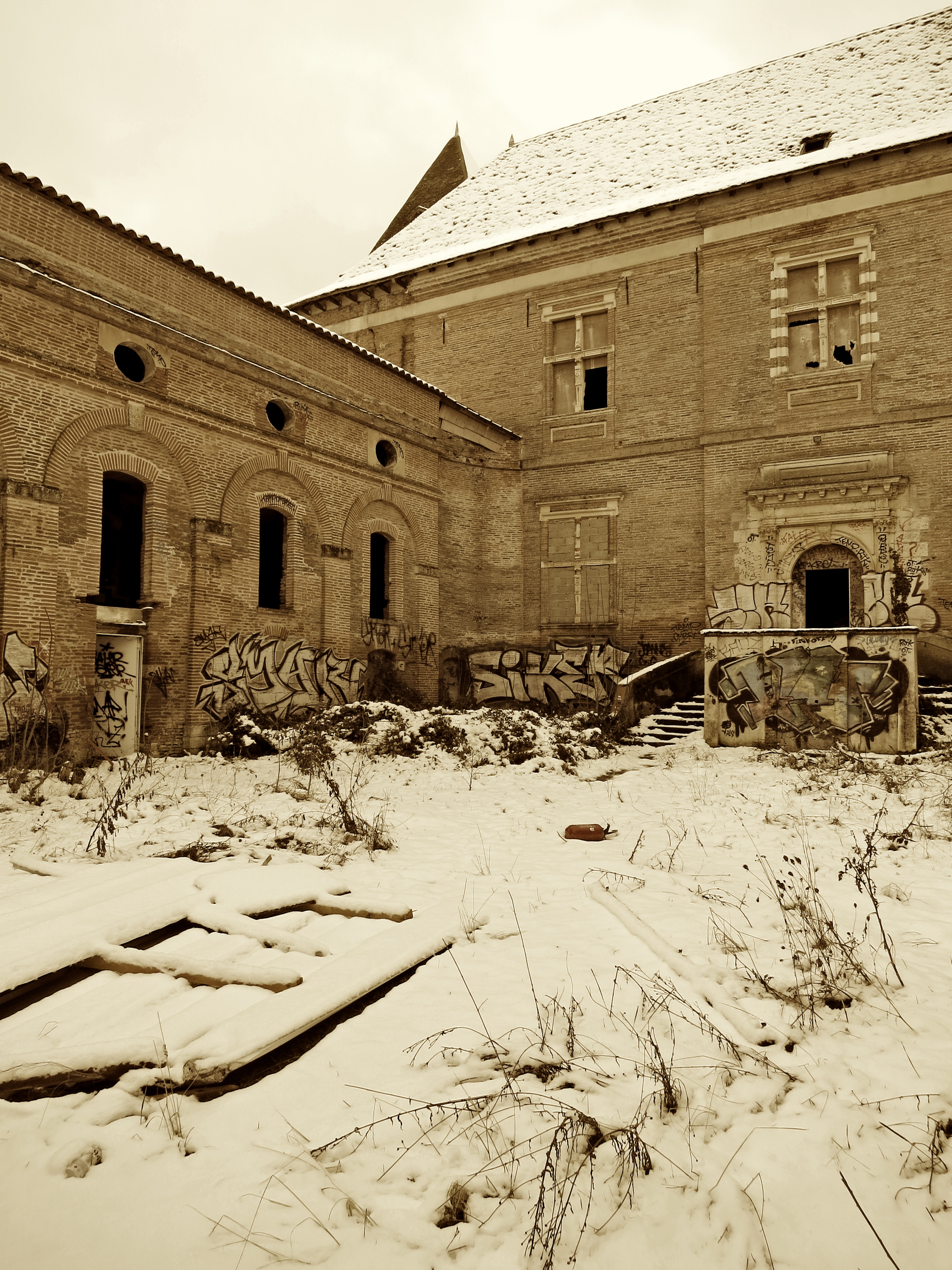 Lacroix-Falgarde (Haute-Garonne, France) - Château de Lacroix.